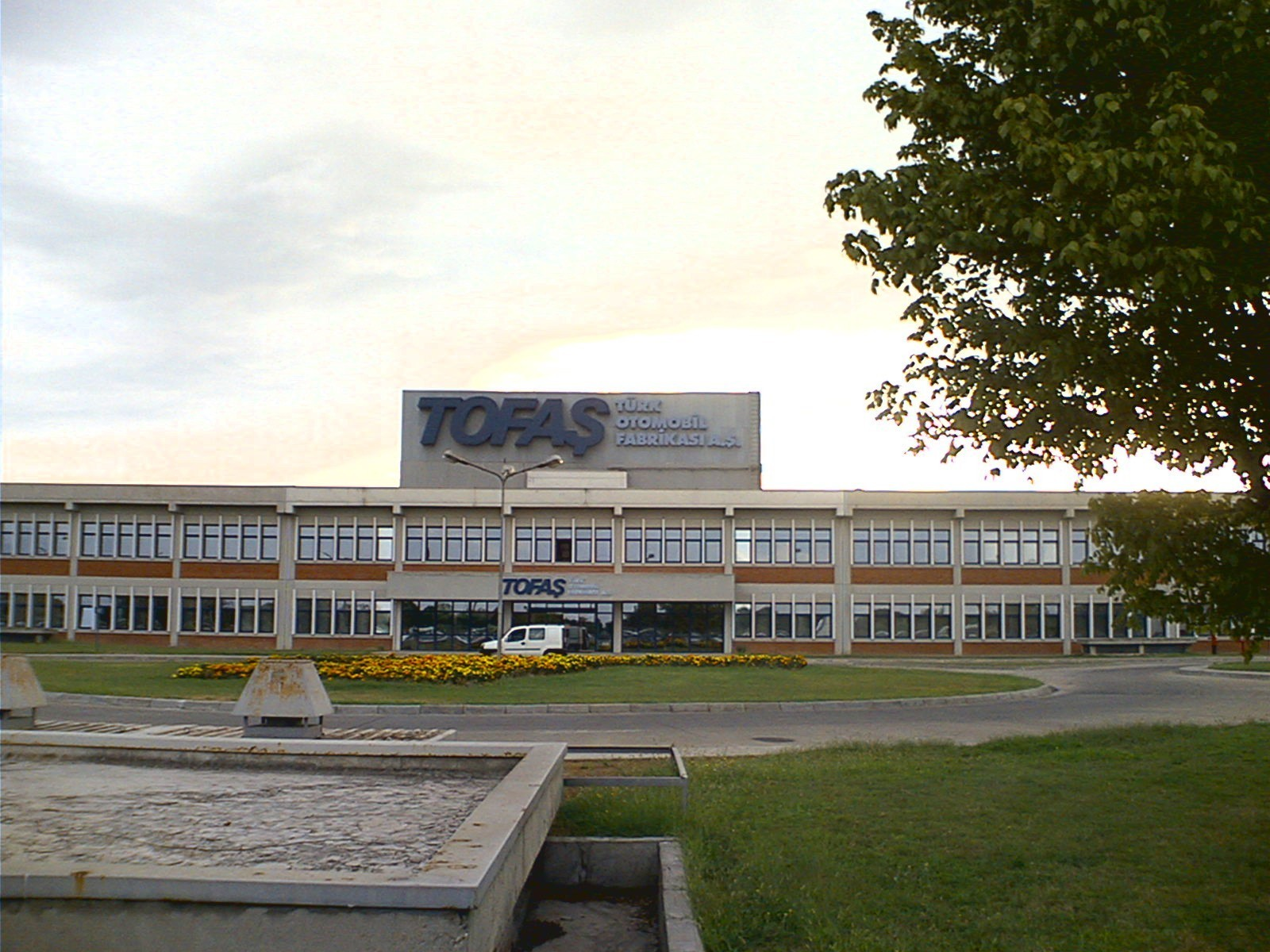 L'ingresso agli uffici dello stabilimento Tofas, a Bursa (Turchia). Immagine realizzata da pnc_net.